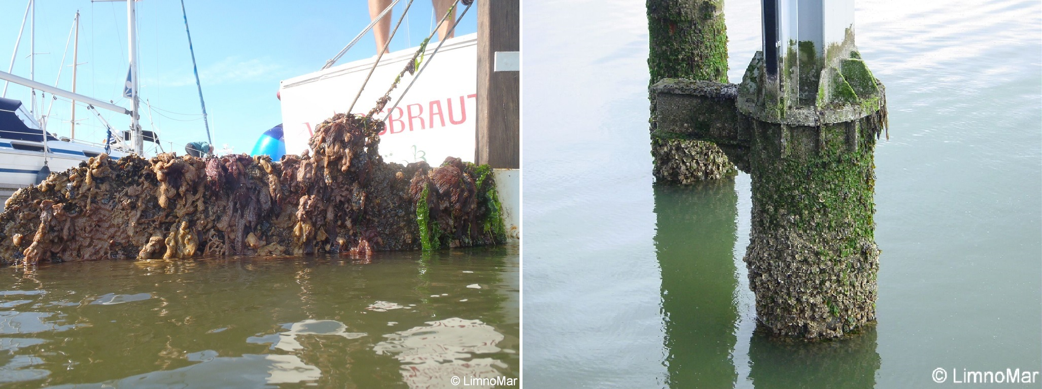 Fouling auf einem Schiffsruder (links) und Messanlagen (rechts).